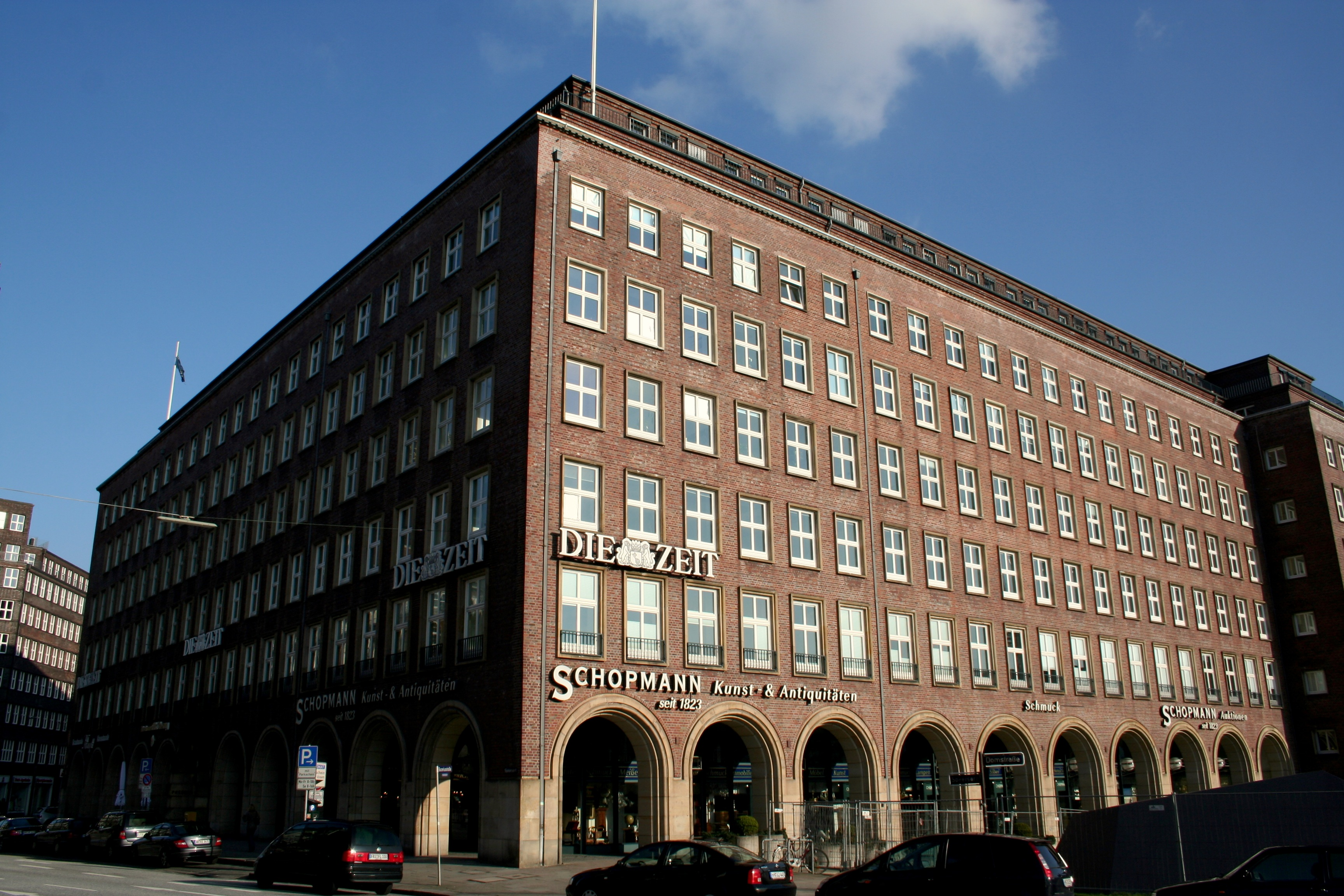 Das Pressehaus am Speersort in Hamburg-Altstadt wurde 1938 für das nationalsozialistische Hamburger Tageblatt errichtet. Heute beherbergt es die Redaktion der Wochenzeitung Die Zeit. This is a photograph of an architectural monument.